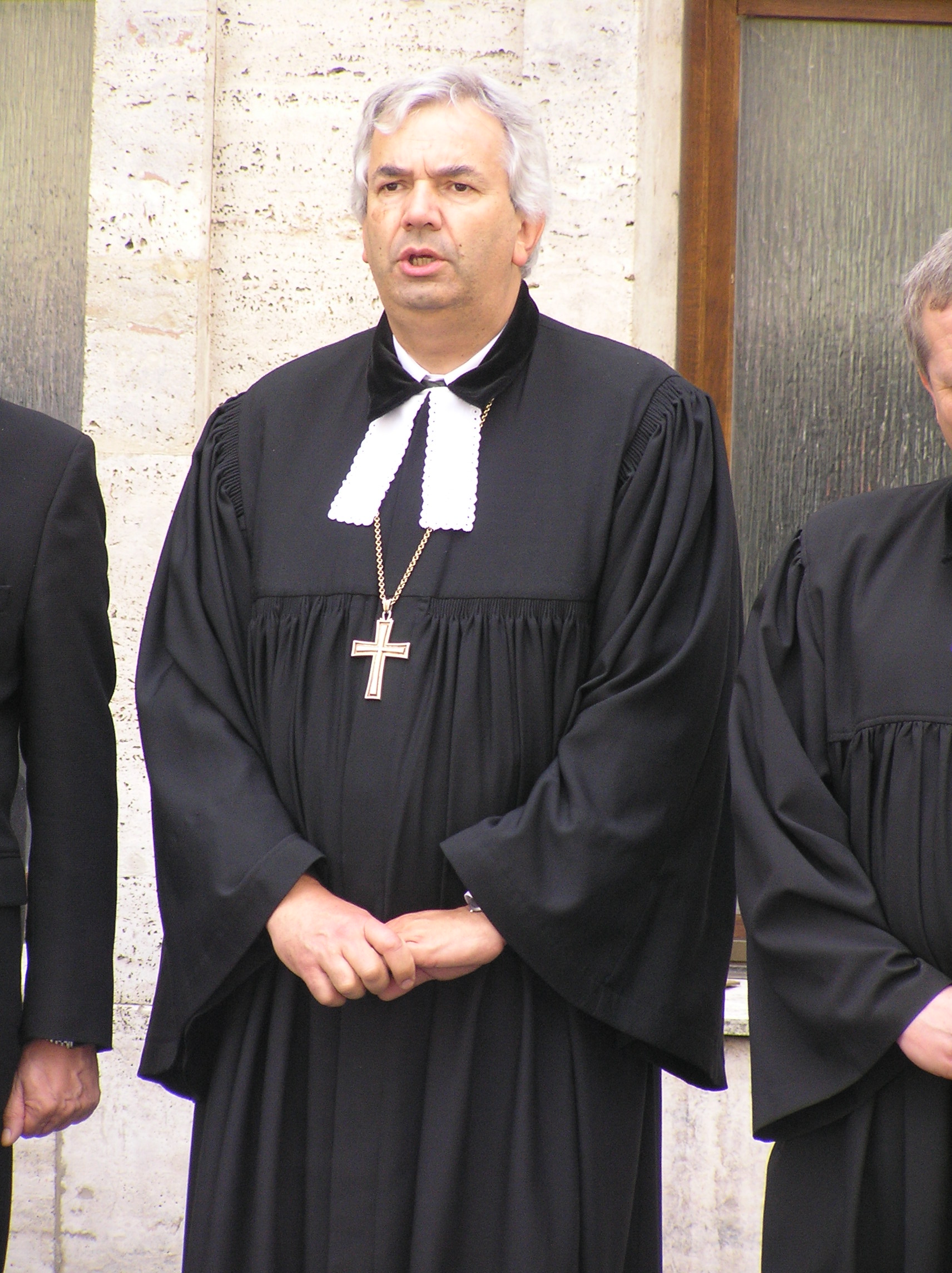 Spev Kto za pravdu horí Július Filo